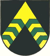 Wappen der Gemeinde Kapfenstein